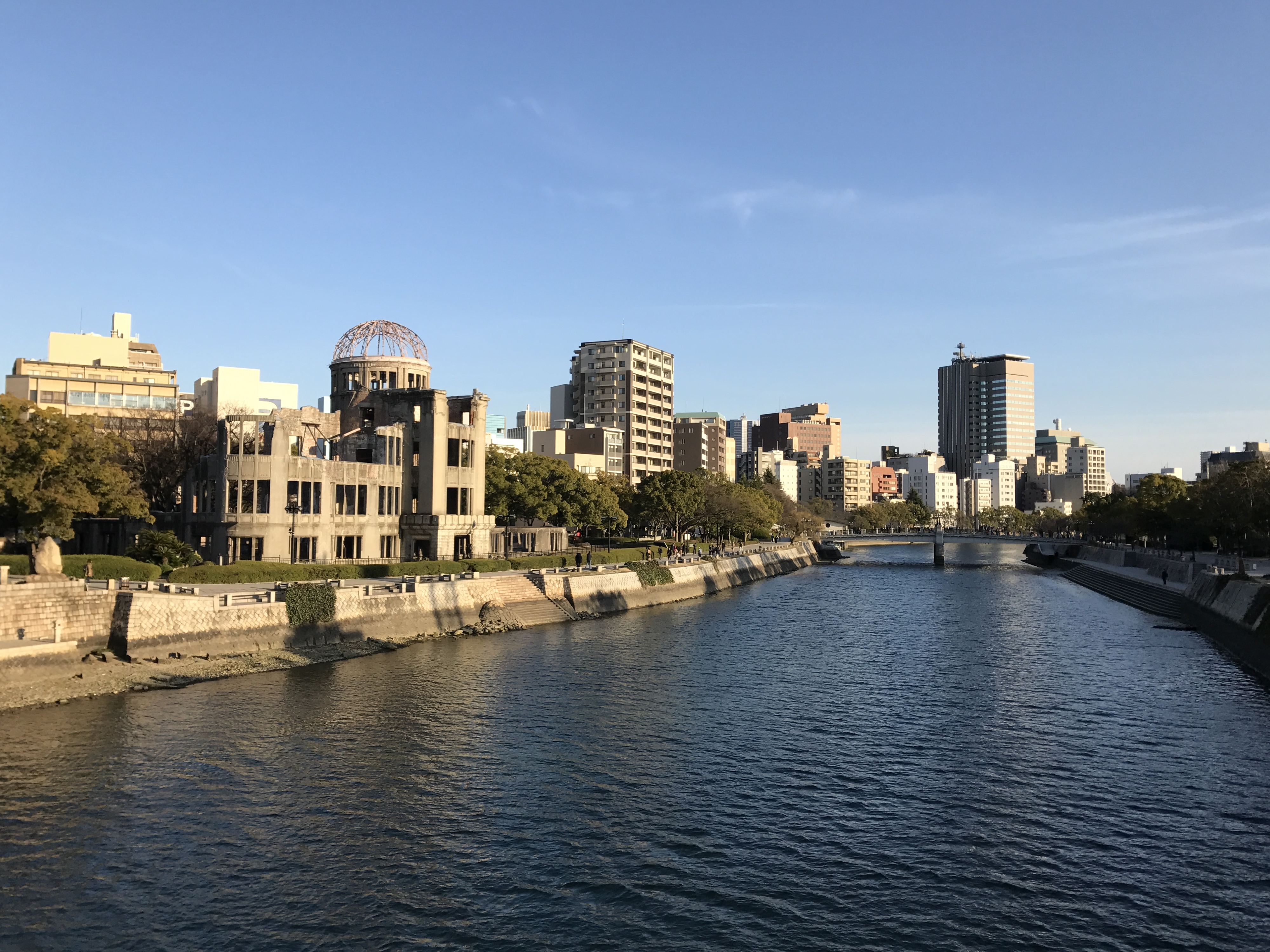 相生橋より望む元安川と原爆ドーム